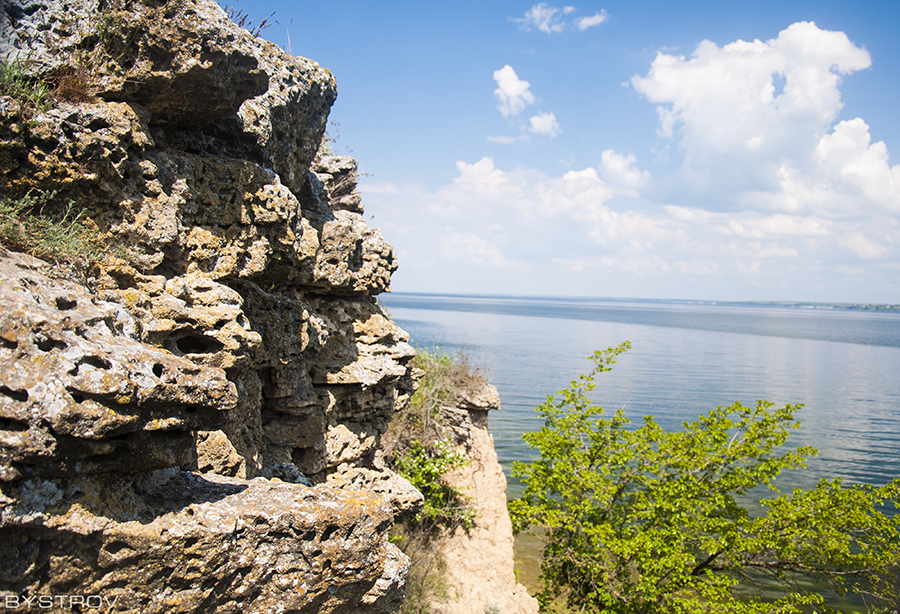 Каменская Сечь